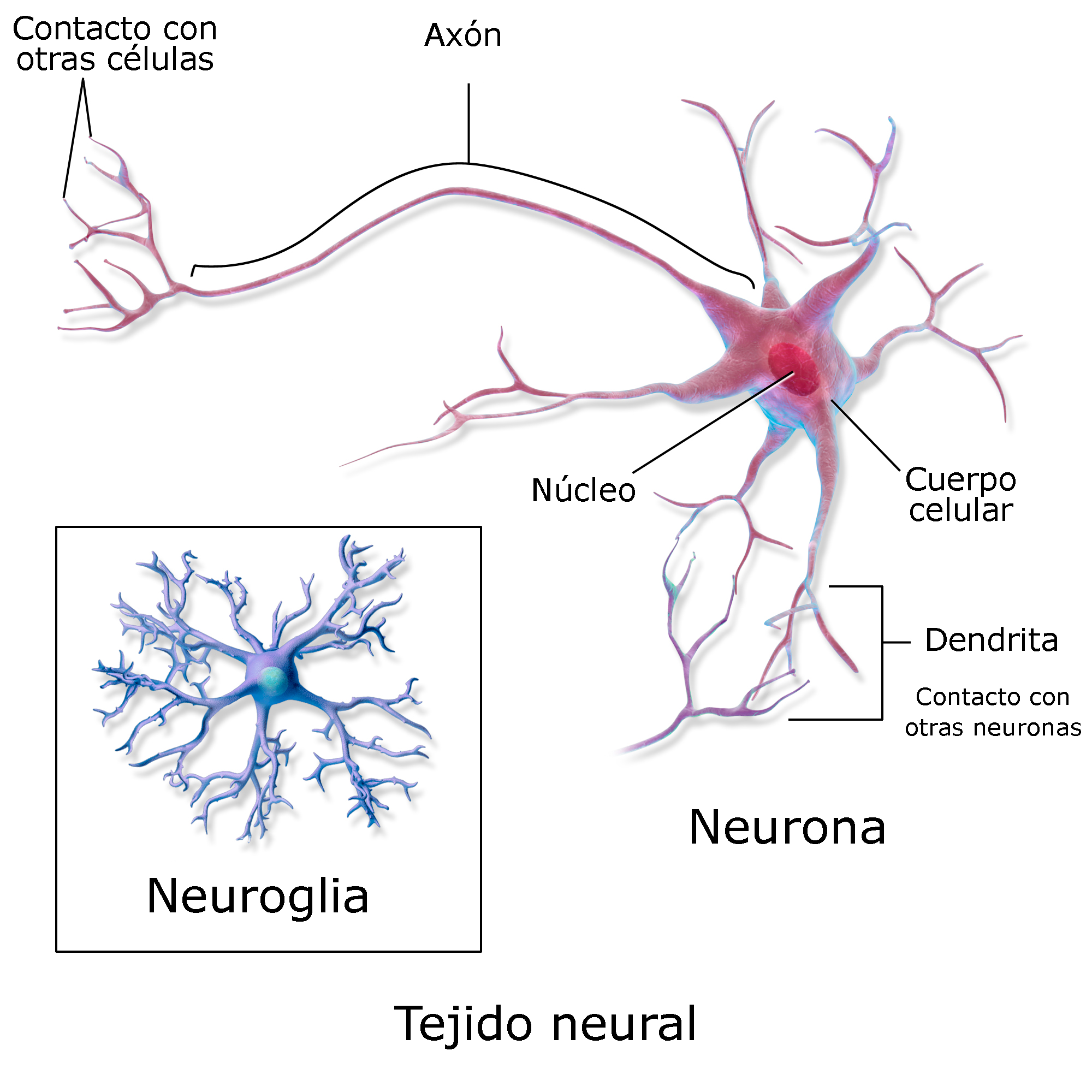 Esquema de una neurona con sus porciones principales y una célula de neuroglia. Ambas forman parte del sistema nervioso.